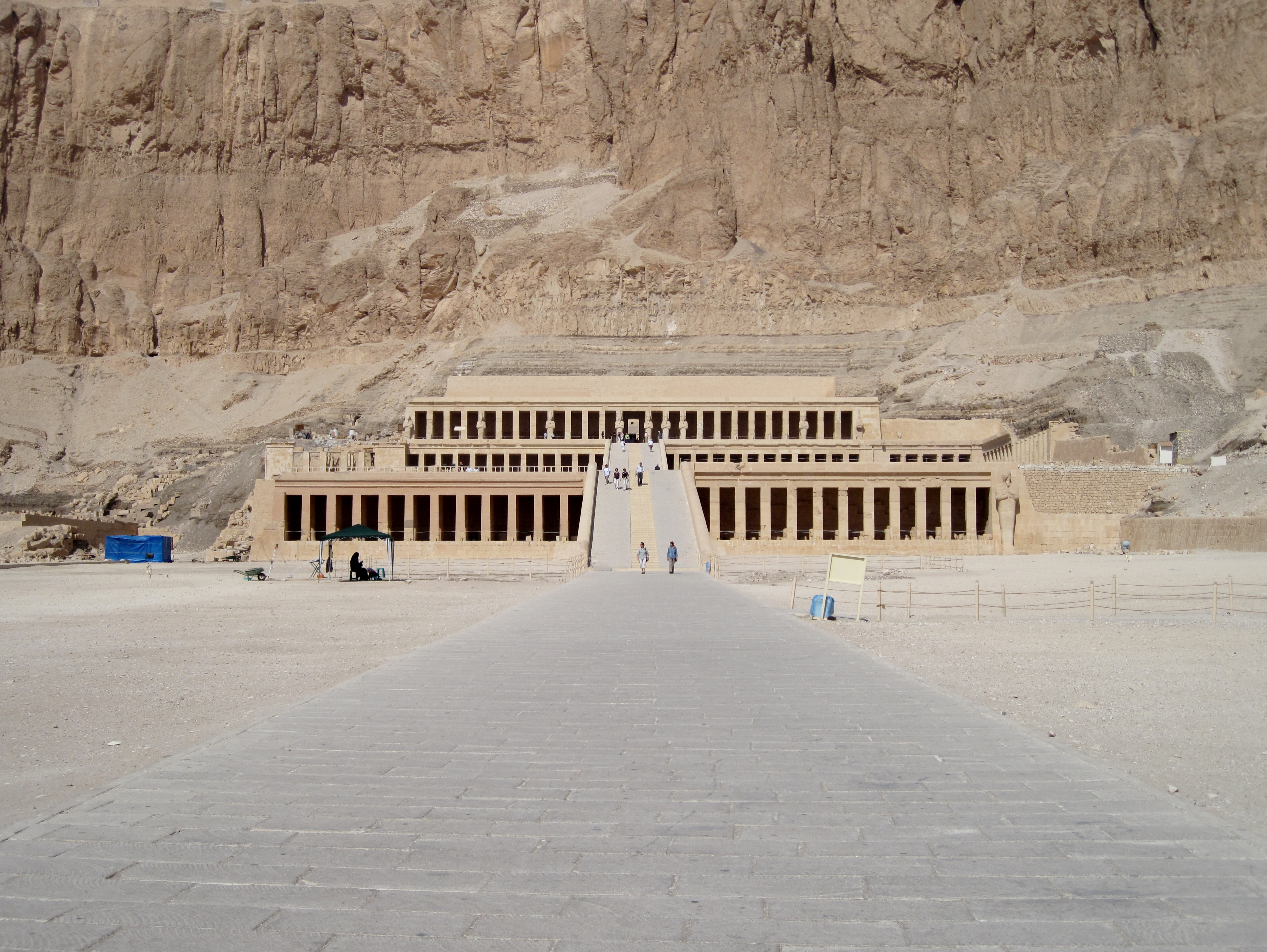 Totentempel der Hatschepsut in Deir el-Bahari nordwestlich von Luxor, Ägypten